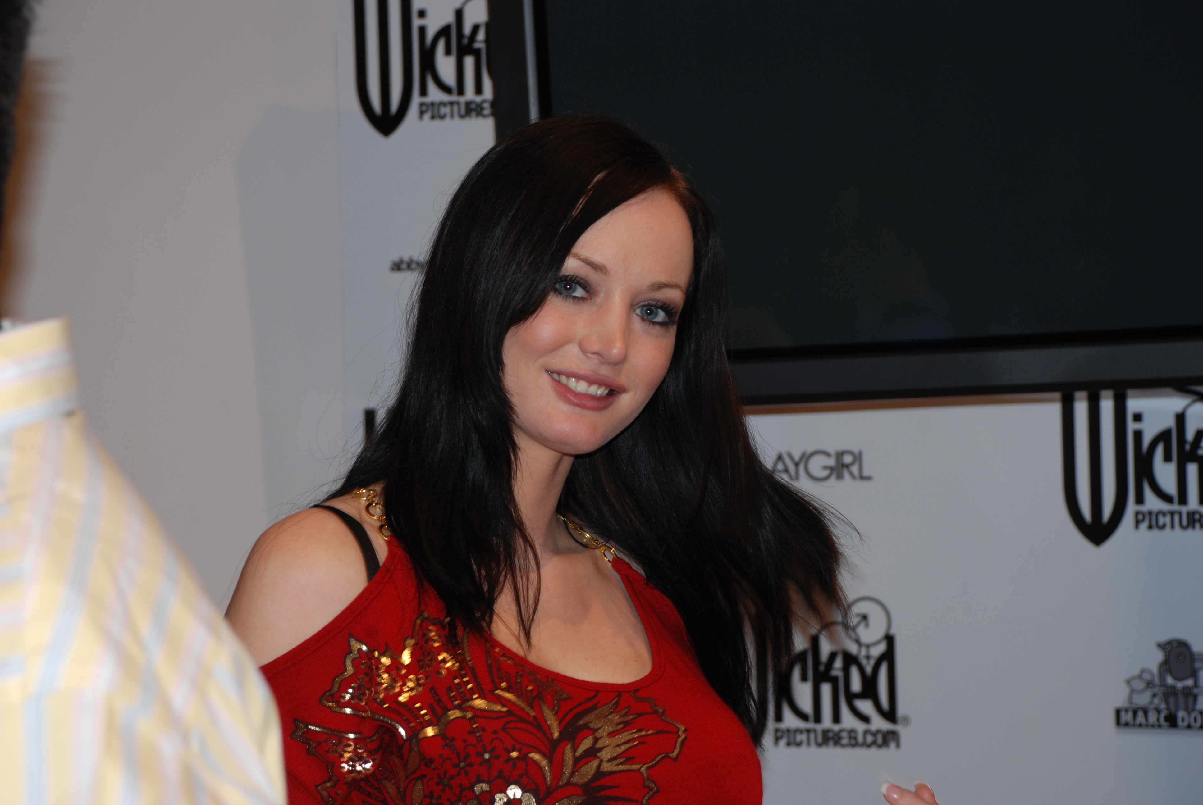 AEE2009_Jan10_Nikon 424